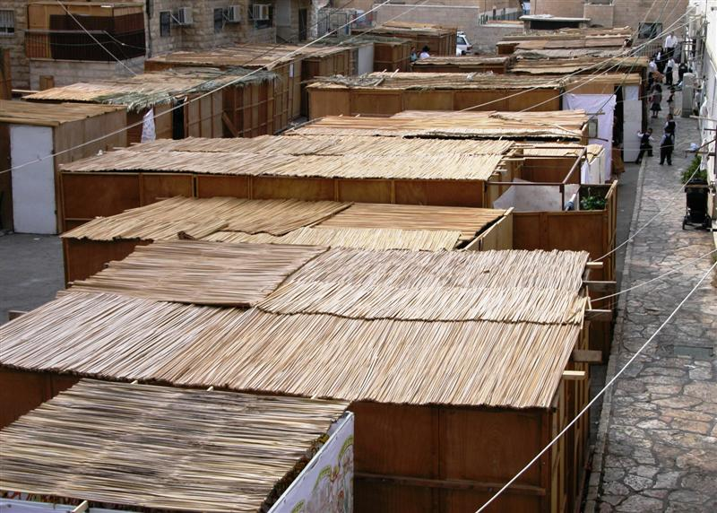 City Of Sukkas In Jerusalem